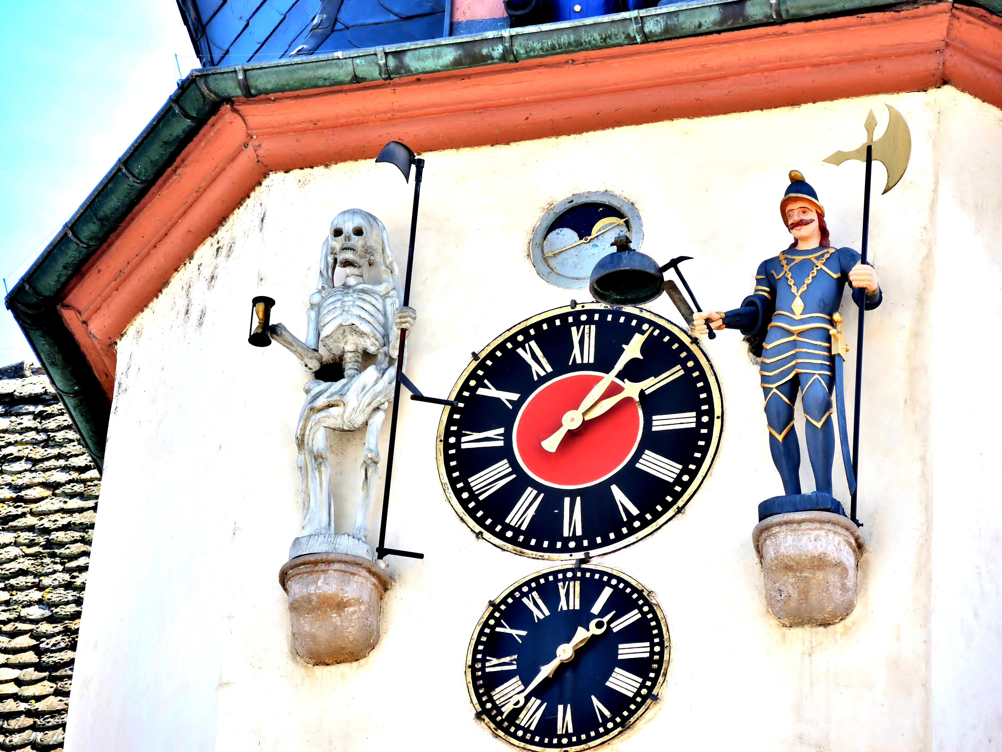 Automates du Jacquemart au-dessus de la mairie de Benfeld. Bas-Rhin